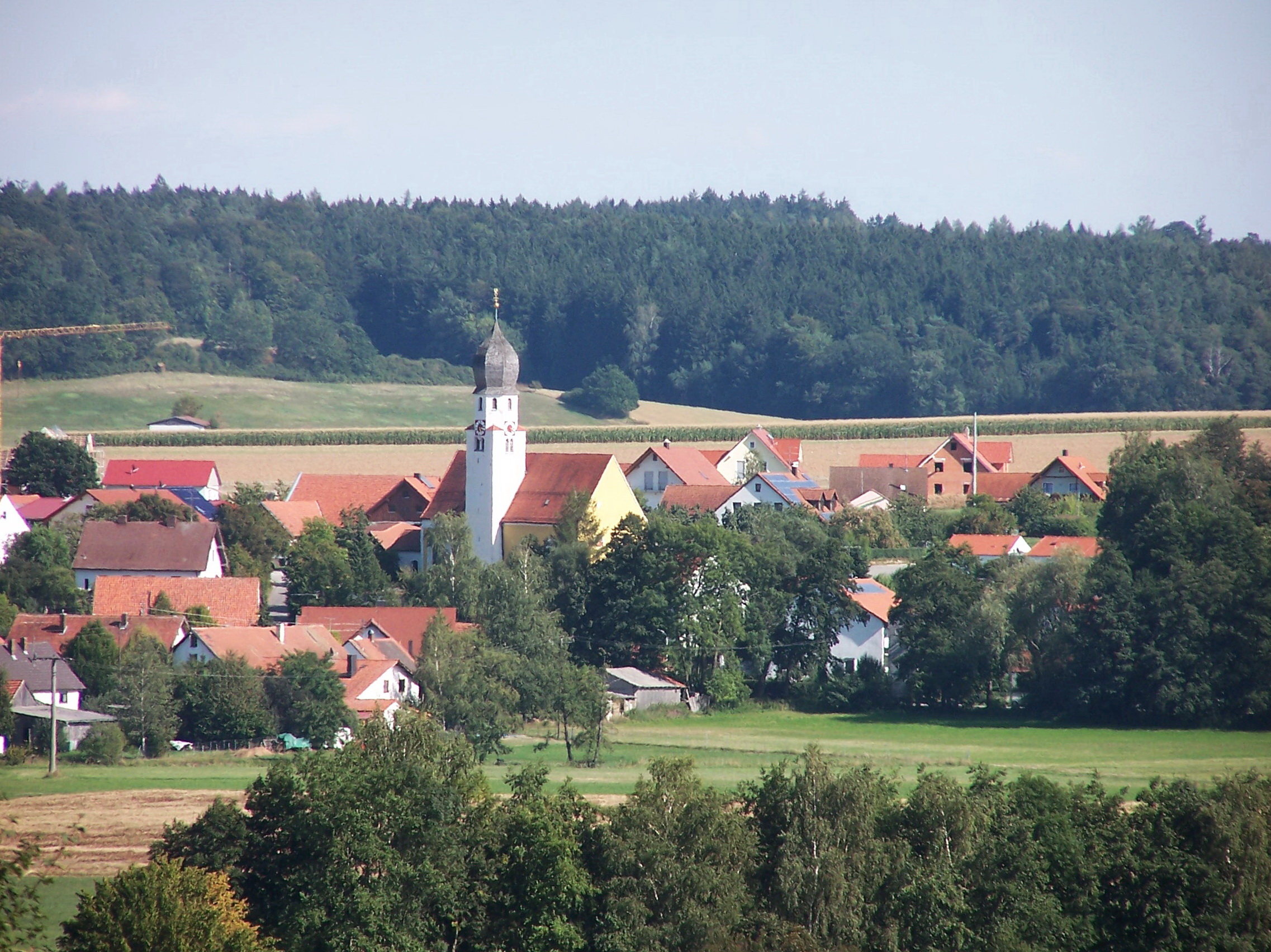 Sandsbach, Am Kirchberg 3; Am Kirchberg 2. Katholische Pfarrkirche St. Petrus. Saalkirche mit Steildach und eingezogenem, fünfseitig geschlossenem Chor, Turm mit Zwiebelhaube in die Nordostecke des Langhauses eingestellt. Langhaus und Turm im Kern um die Mitte des 13. Jahrhunderts. Chor spätgotisch, um die Mitte des 15. Jahrhunderts. Umgestaltung der Kirche nach Mitte des 18. Jahrhunderts; mit Ausstattung.